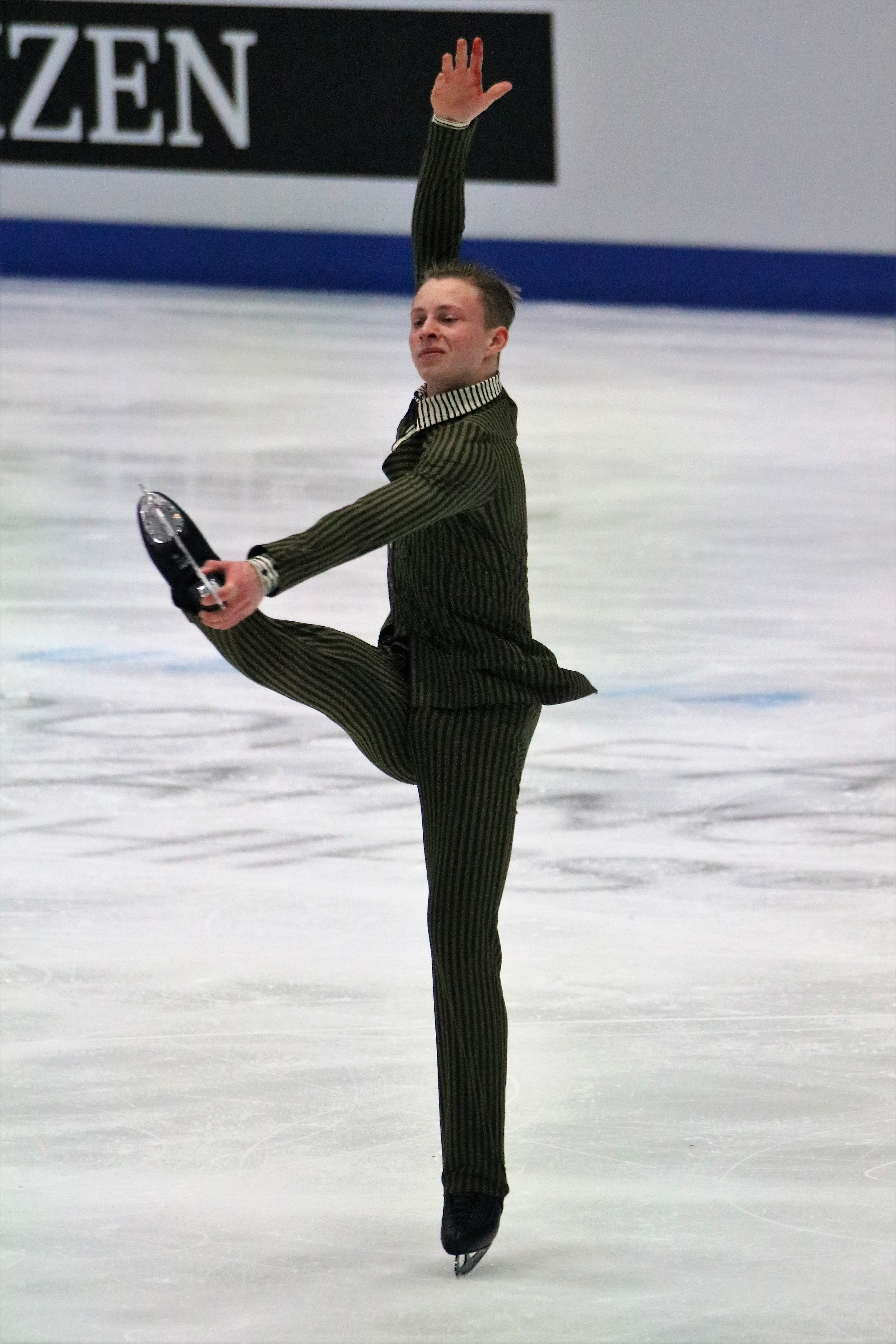 Николай Майоров (Швеция) на чемпионате Европы по фигурному катанию 2020